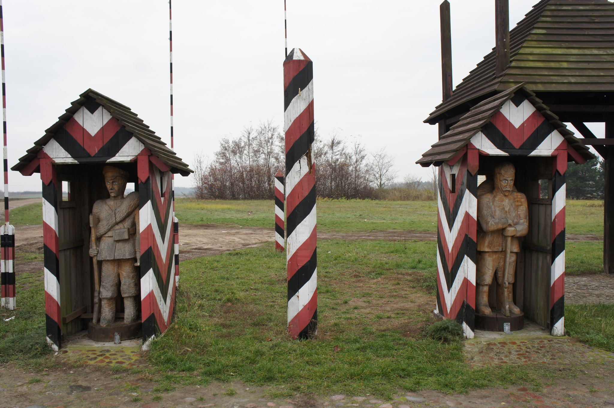 Rekonstrukcja przejścia granicznego w pobliżu Borzykowo w miejscu przebiegu dawnej granicy prusko-rosyjskiej. Obiekt przygotowany przez Towarzystwo Kulturalne "Echo Pyzdr".